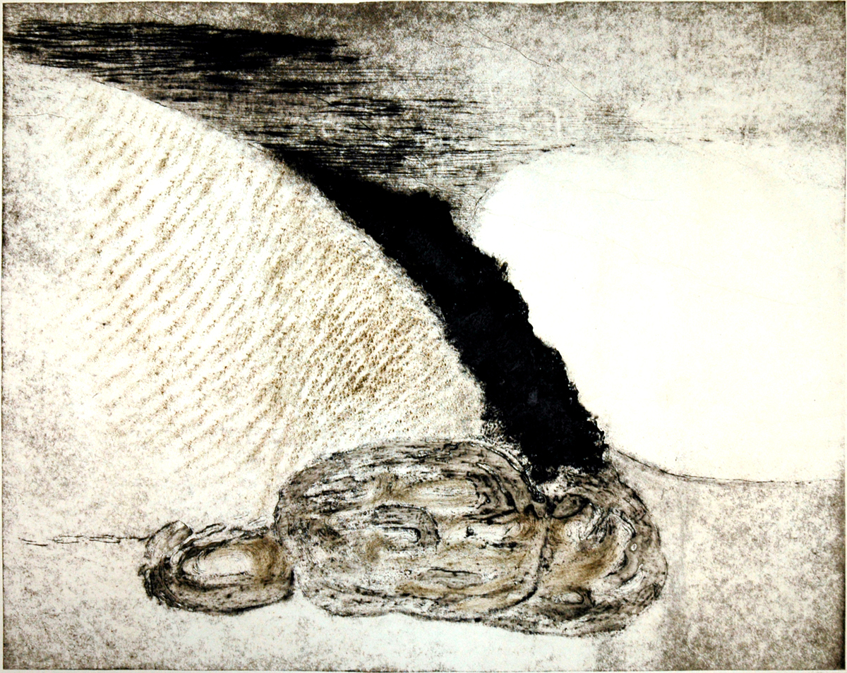 Romana Rotterová, KAMENY II, kombinovaná technika,42x52 cm (1988)